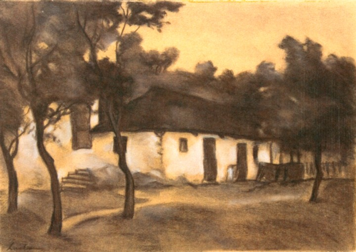 Casă la Brebu (Casa lui Moș Gheorghe), Pastel, cărbune şi tempera pe hârtie, 30 x 40 cm, Muzeul Naţional de Artă al României - BUCUREŞTI